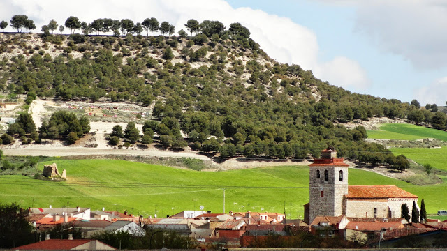 Geria